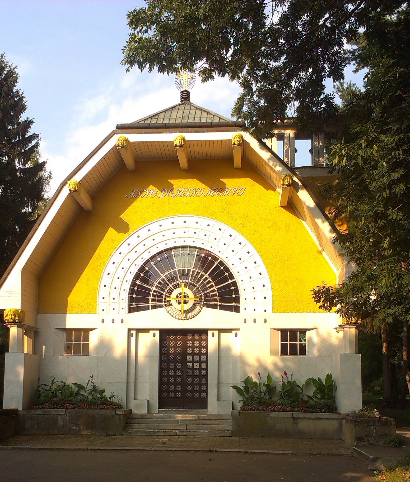 Psychiatrická léčebna, Havlíčkova 1265/50, Kroměříž. Pavilon 32 - márnice s pitevnou a výkropní kaplí.